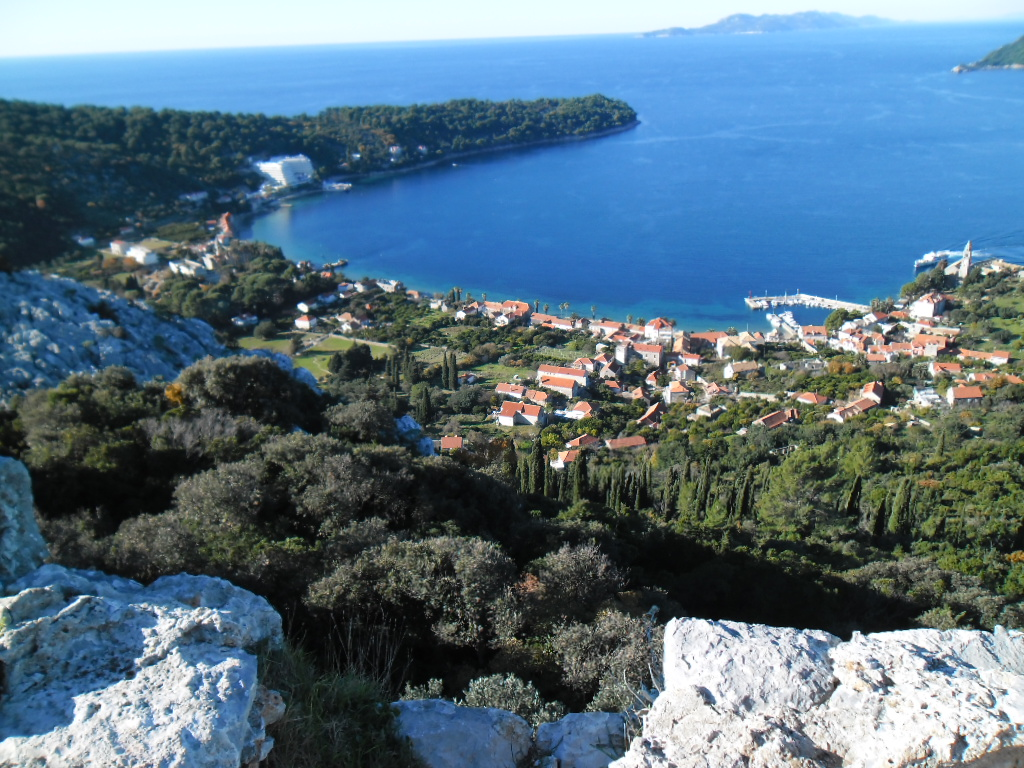 pogled na naselje Lopud sa španjolske utvrde Sutvrač